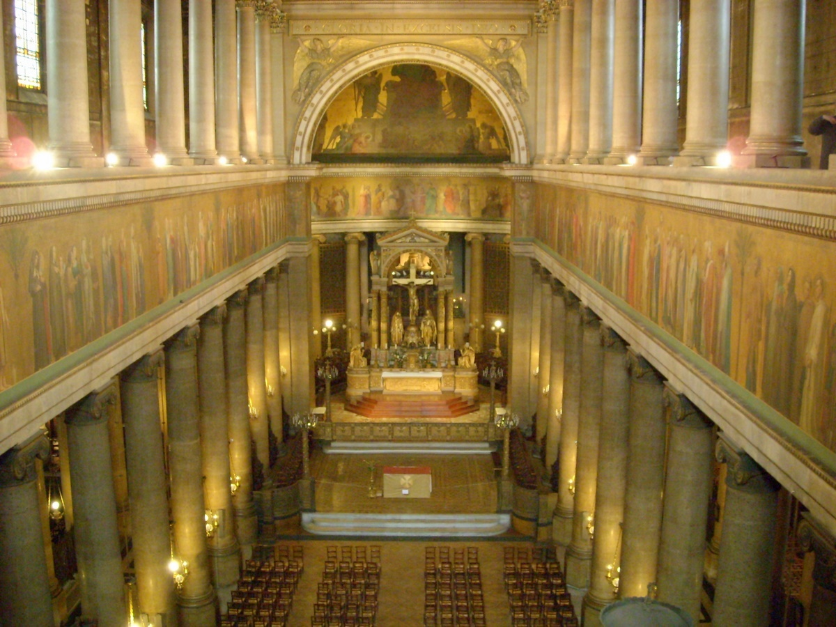 Vue générale de la nef de l'église Saint-Vincent-de-Paul. La frise qui entoure la nef est d'Hippolyte Flandrin.